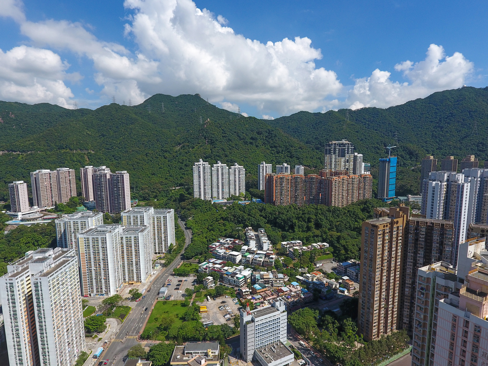 Tai Wai